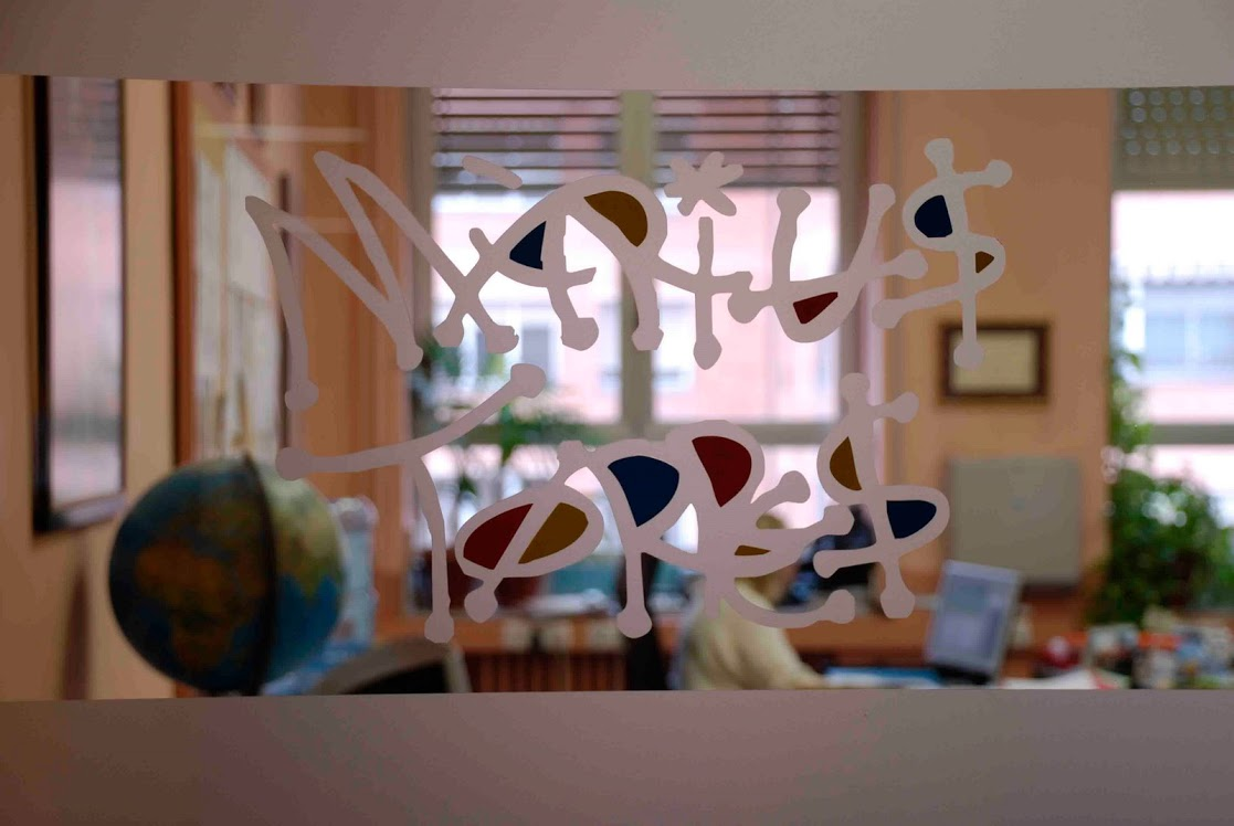 Secretaria de l'Institut Màrius Torres